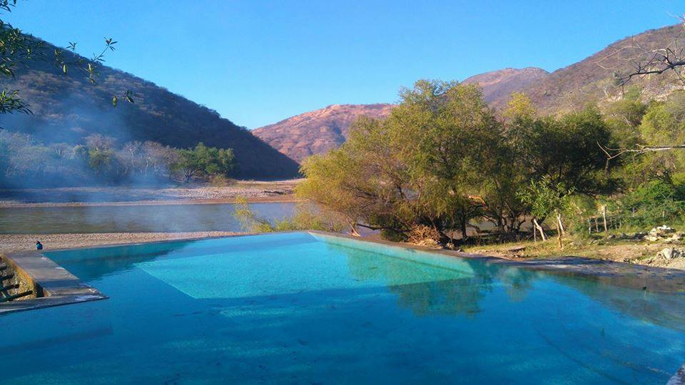 Alberca del Balneario de Ecoturistico de Papalutla, al fondo se observa el Rio Balsas